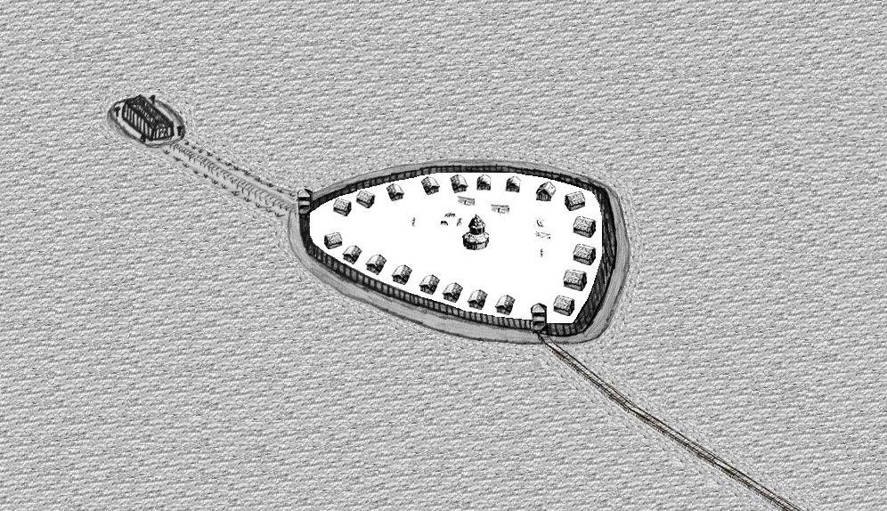 Rekonstruktionsversuch der Rethraburg im 10. Jahrhundert; Ronny Krüger, Neubrandenburg